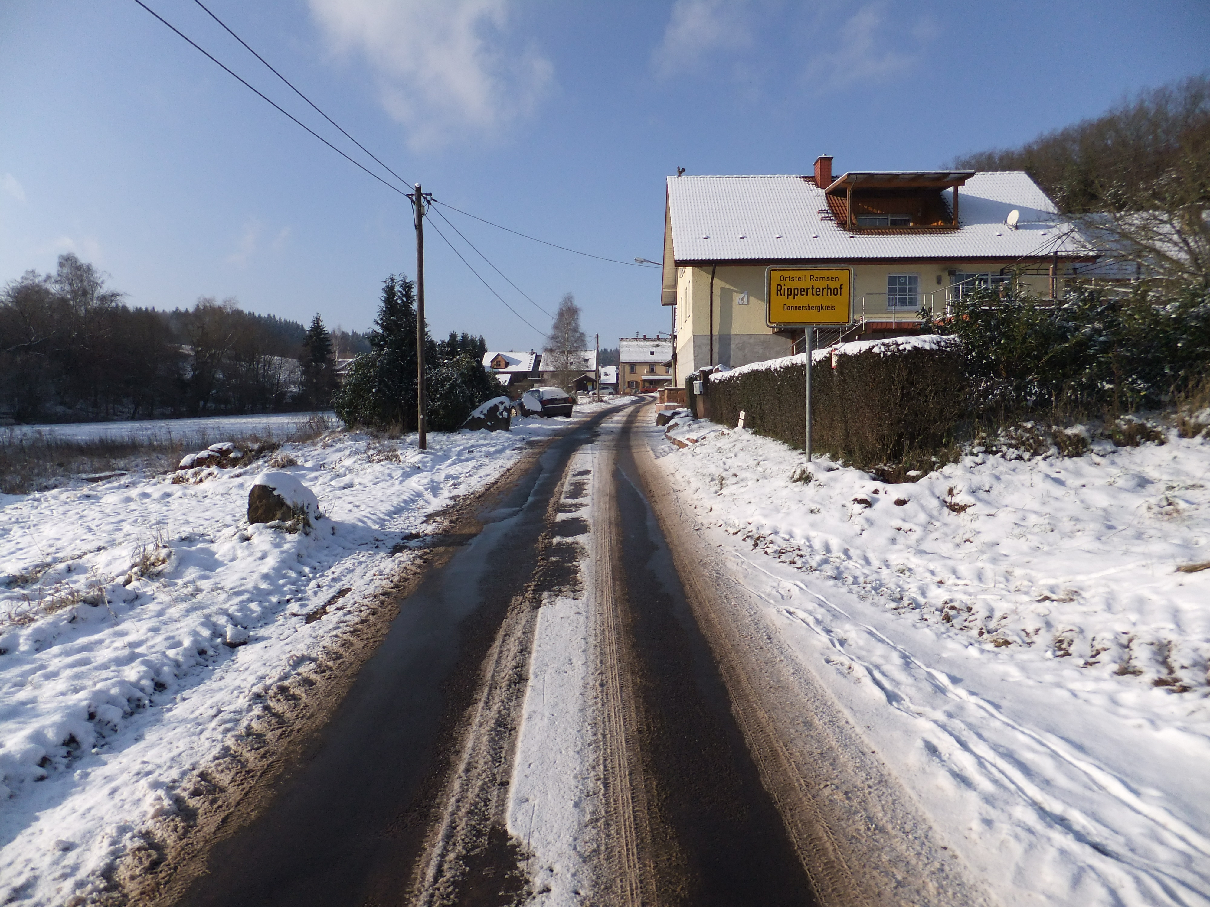 Die Ortseinfahrt von Ripperterhof, einem Ortsteil von Ramsen in der Pfalz in Rheinland-Pfalz (Deutschland)